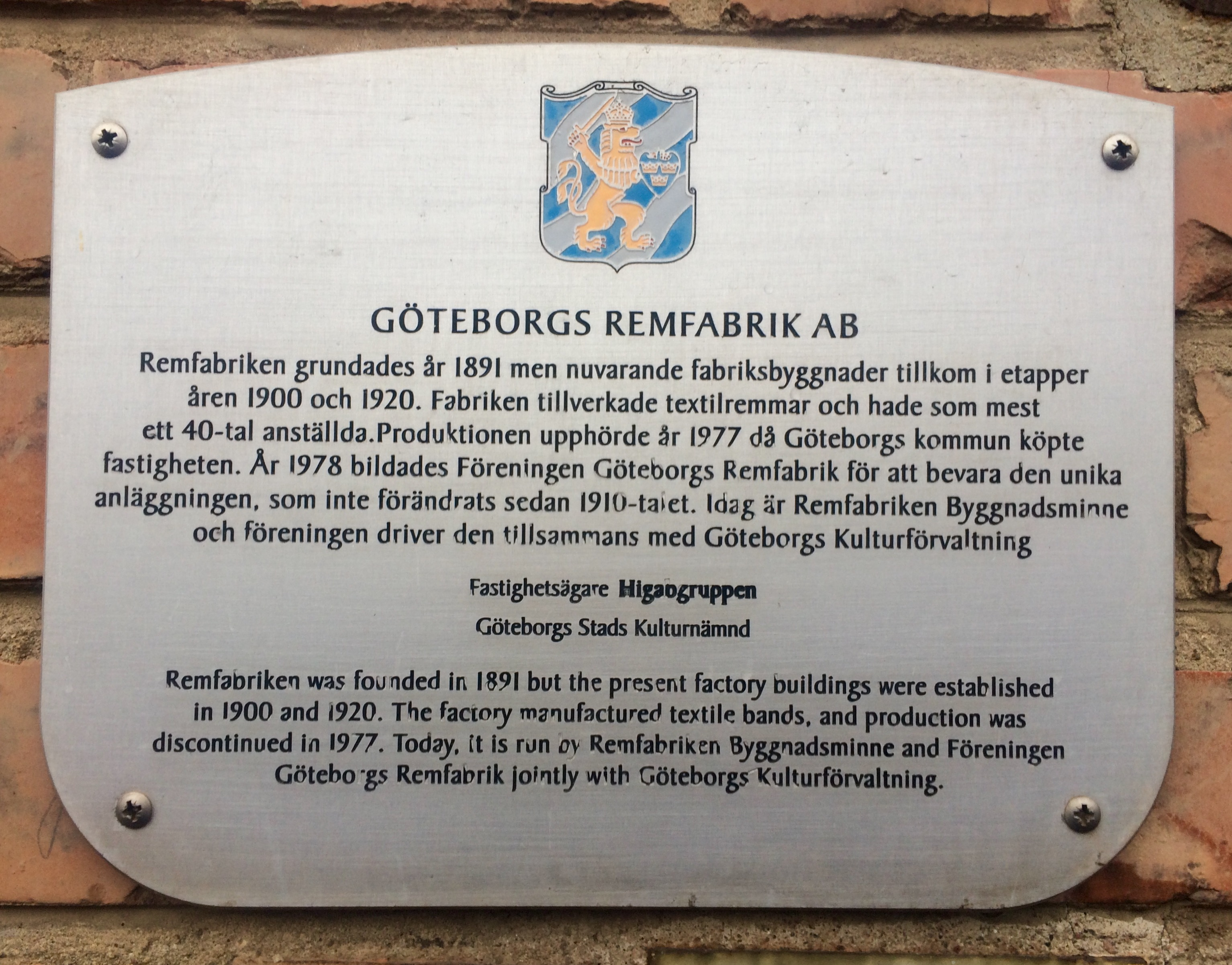 Informationsplakett om Göteborgs Remfabrik uppsatt bredvid entrén vid Åvägen 15 i Göteborg. Plaketten uppsattes som en del av Göteborgs stads kulturnämnds "Projekt Husmärkning" kring år 2000/2001 där drygt hundra plaketter ingick (ca 10 skyltar per månad). Se även boken "100 utmärkta hus i Göteborg". Vid en inventering av kommunen gjord 2016 satt 69 plaketter fortfarande uppe. Två år senare när många av dem fotograferades för wikipedia var ännu fler nertagna.